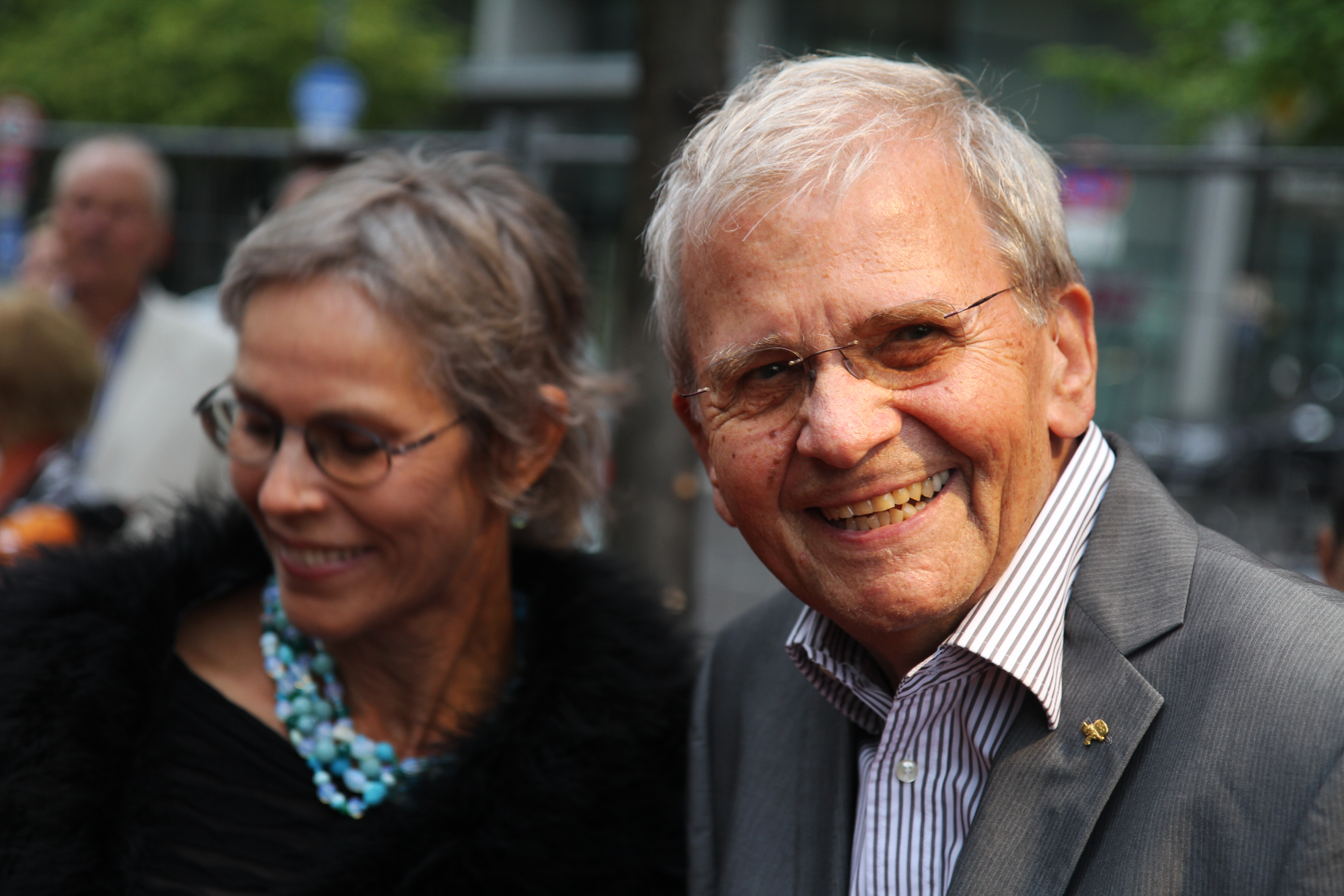 Jost Vacano mit seiner Ehefrau Dagmar